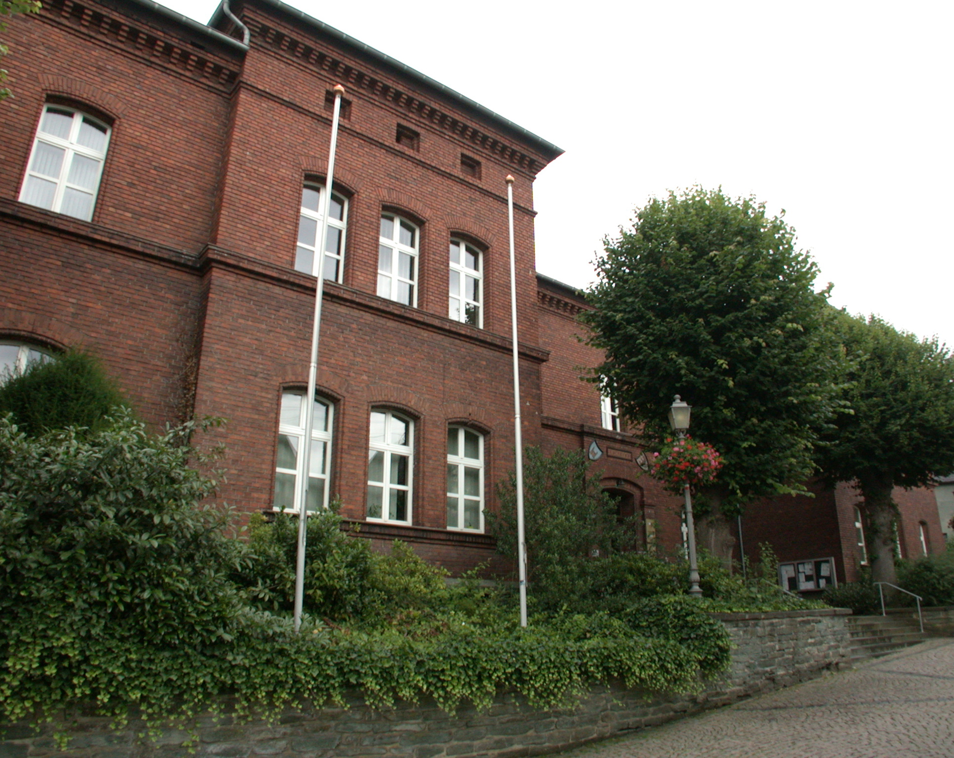 Rathaus der Stadt Runkel